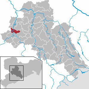 Wechselburg in Saxony - district Mittelsachsen